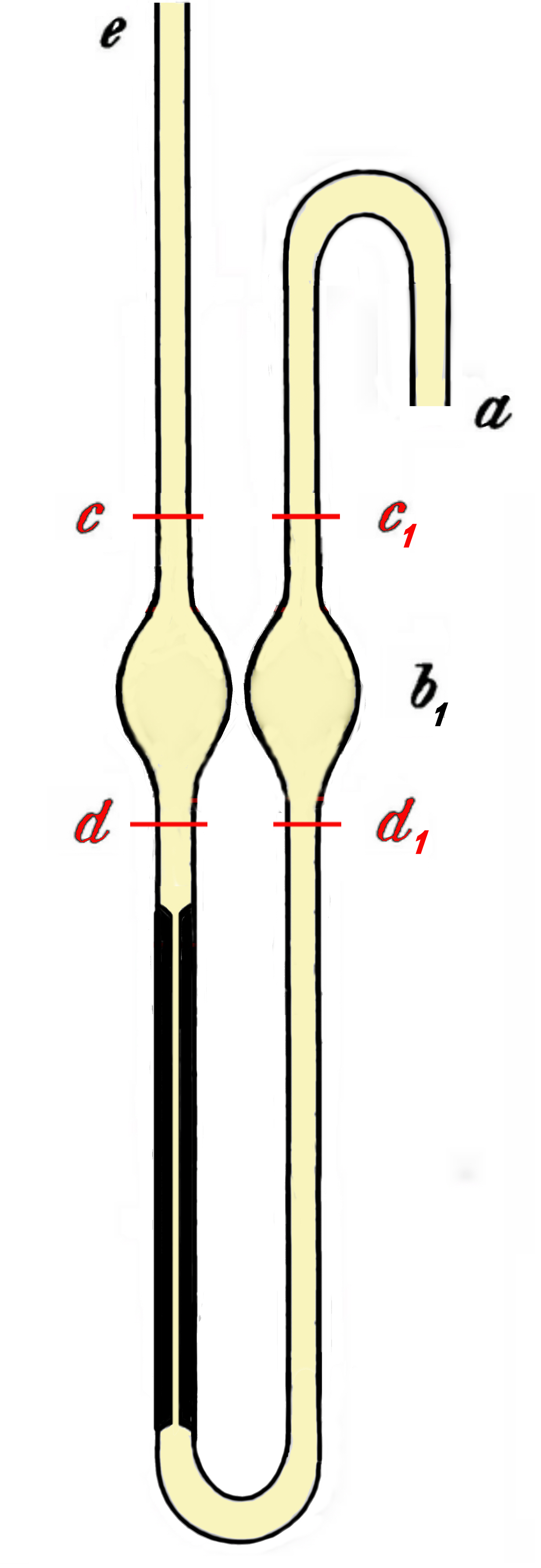 Ubbelohde Kapillarviskosimeter: e = Einfüllung, Kapillare, cd1 - dc1 = Meßstrecke